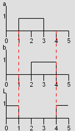 Chronogramme Fonction logique ou non (nor en anglais) à deux entrées. Licensing Utilisateur:Max81 Catégorie:Schémas d'électronique